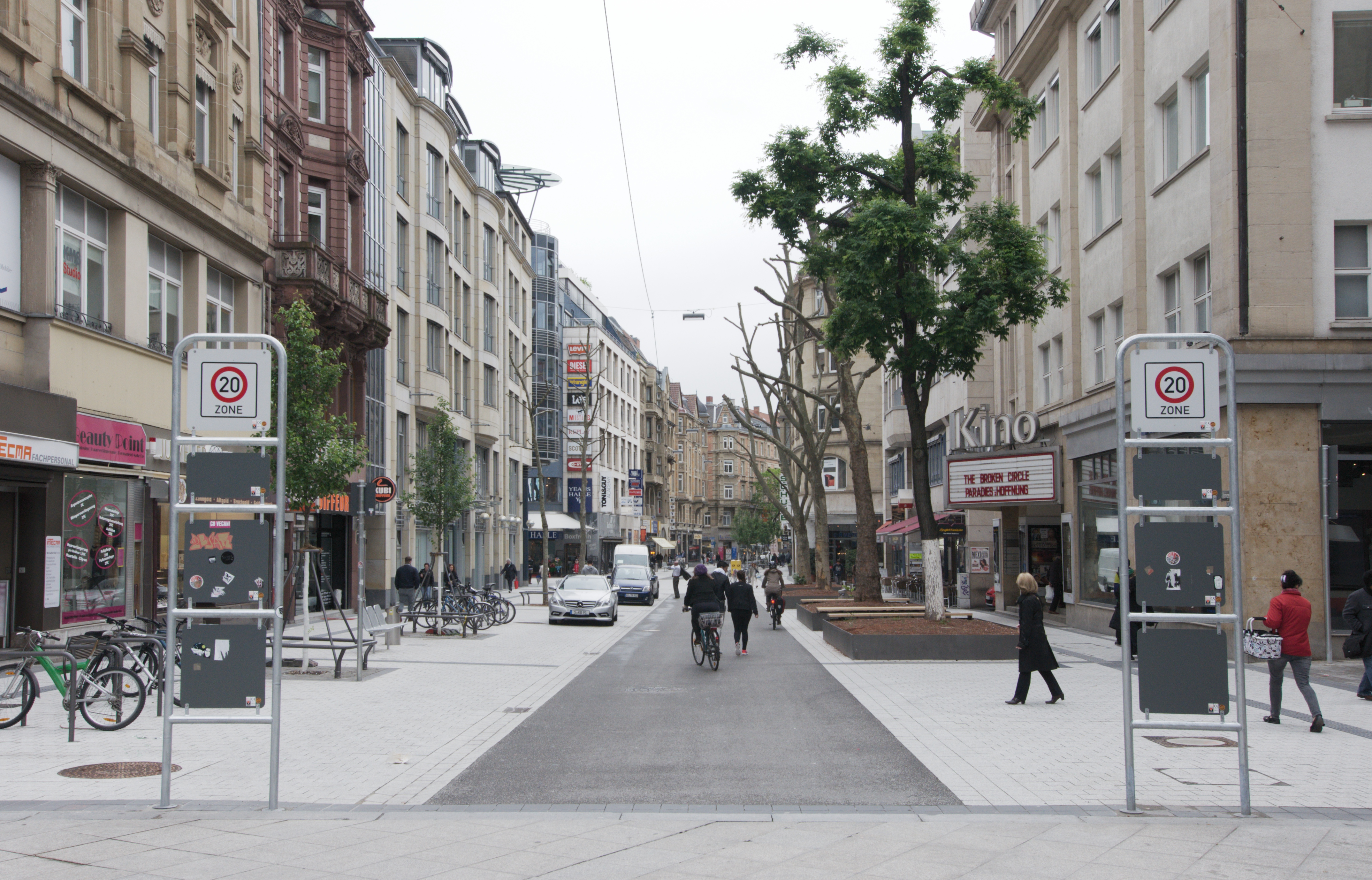 Stuttgart, Tübinger Straße, asphaltierte Tempo-20-Stadtstrasse als Netztelement für den Radverkehr in dicht mit Wohnhäusern bebautem Gebiet, ohne Bordsteine und Parkverbote, dafür mit Baumpflanzungen und Fahrradabstellanlagen, nahezu ein Shared space.